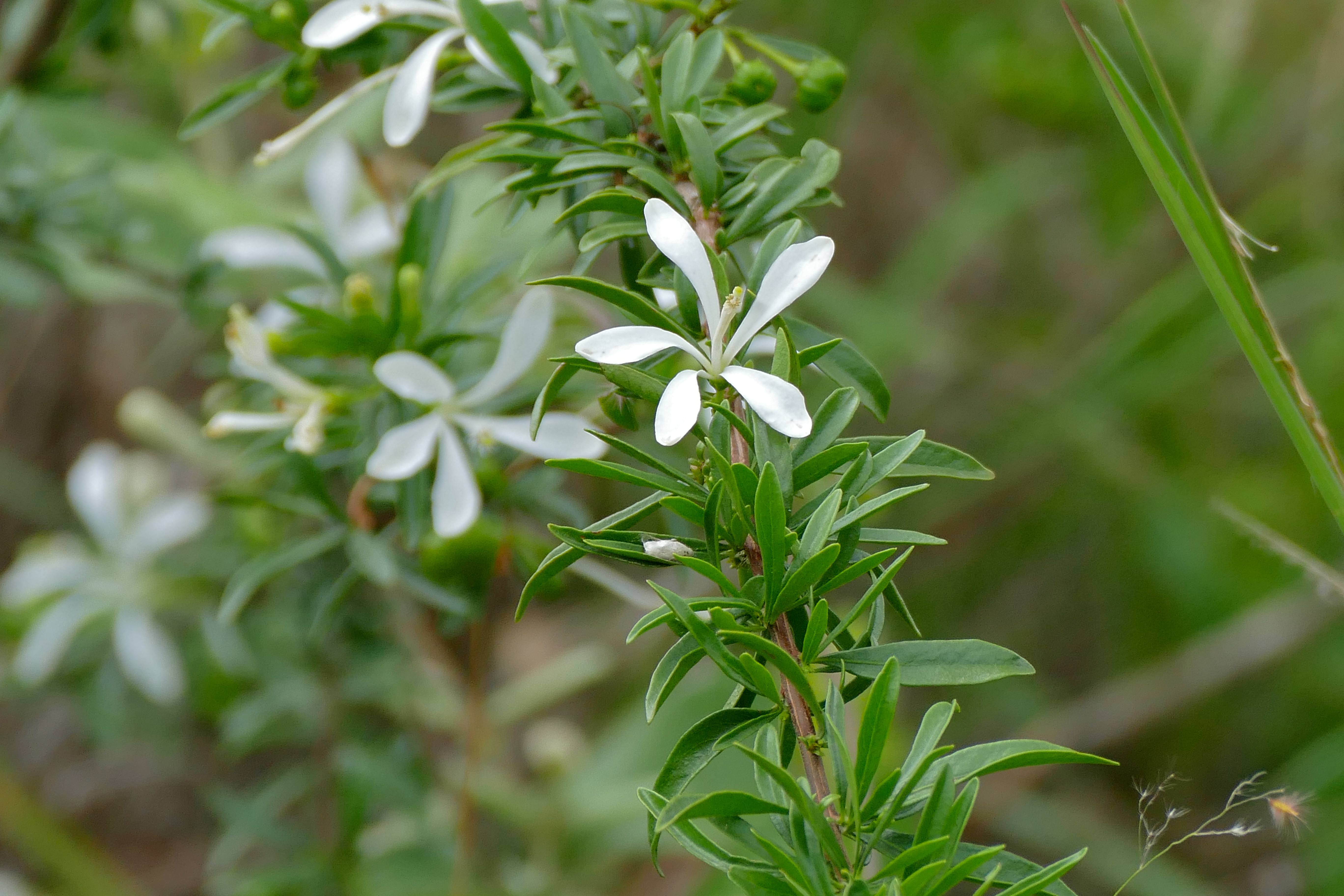 S139 Road West of Biyamiti, Kruger NP, SOUTH AFRICA